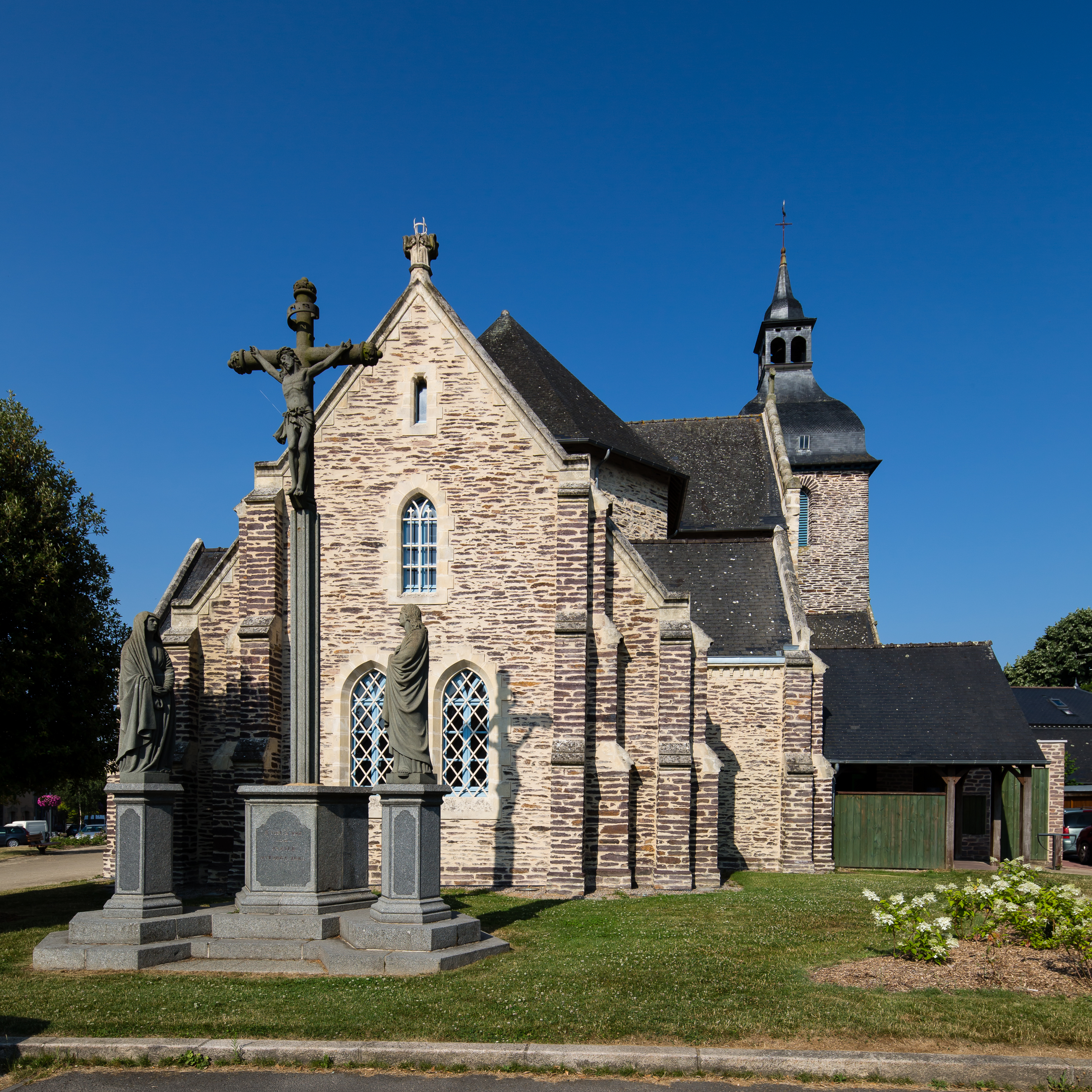 Chevet de l'église Saint-Pierre de Plélan-le-Grand (France).